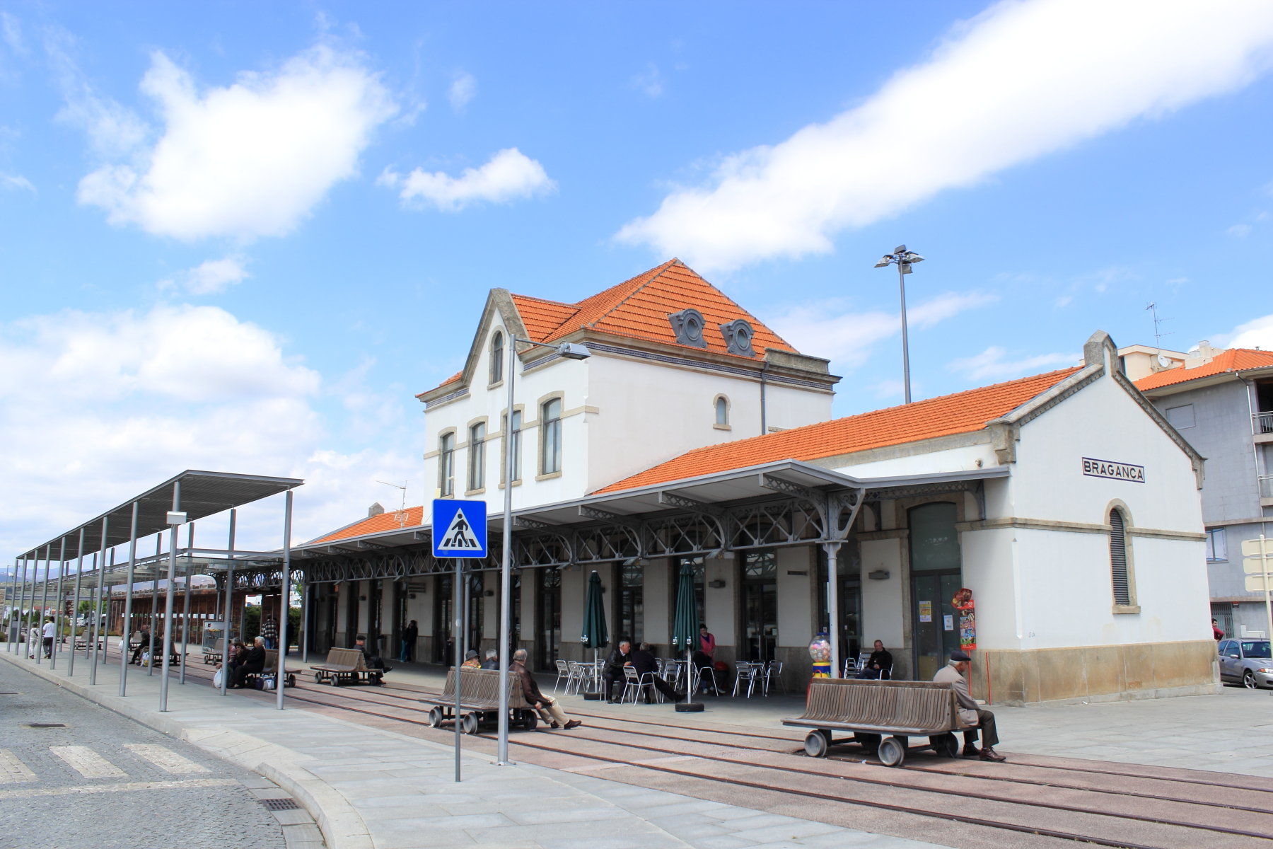 Estación de autobuses de Braganza (Estaçao Rodoviária de Bragança), Av. João da Cruz. Según proyecto del arquitecto Carlos Praça, en 2004 se rehabilitó la antigua estación de ferrocarril para convertirla en estación de autobús. Además del edificio se han conservado algunos elementos como andenes y vías. En la estación operan autobuses de corto y largo recorrido a ciudades como Lamego, Oporto, Lisboa, Chaves, Viseu, Braga, Coimbra, Vila Real o Viana do Castelo. Braganza (Bragança) Distrito de Braganza Portugal